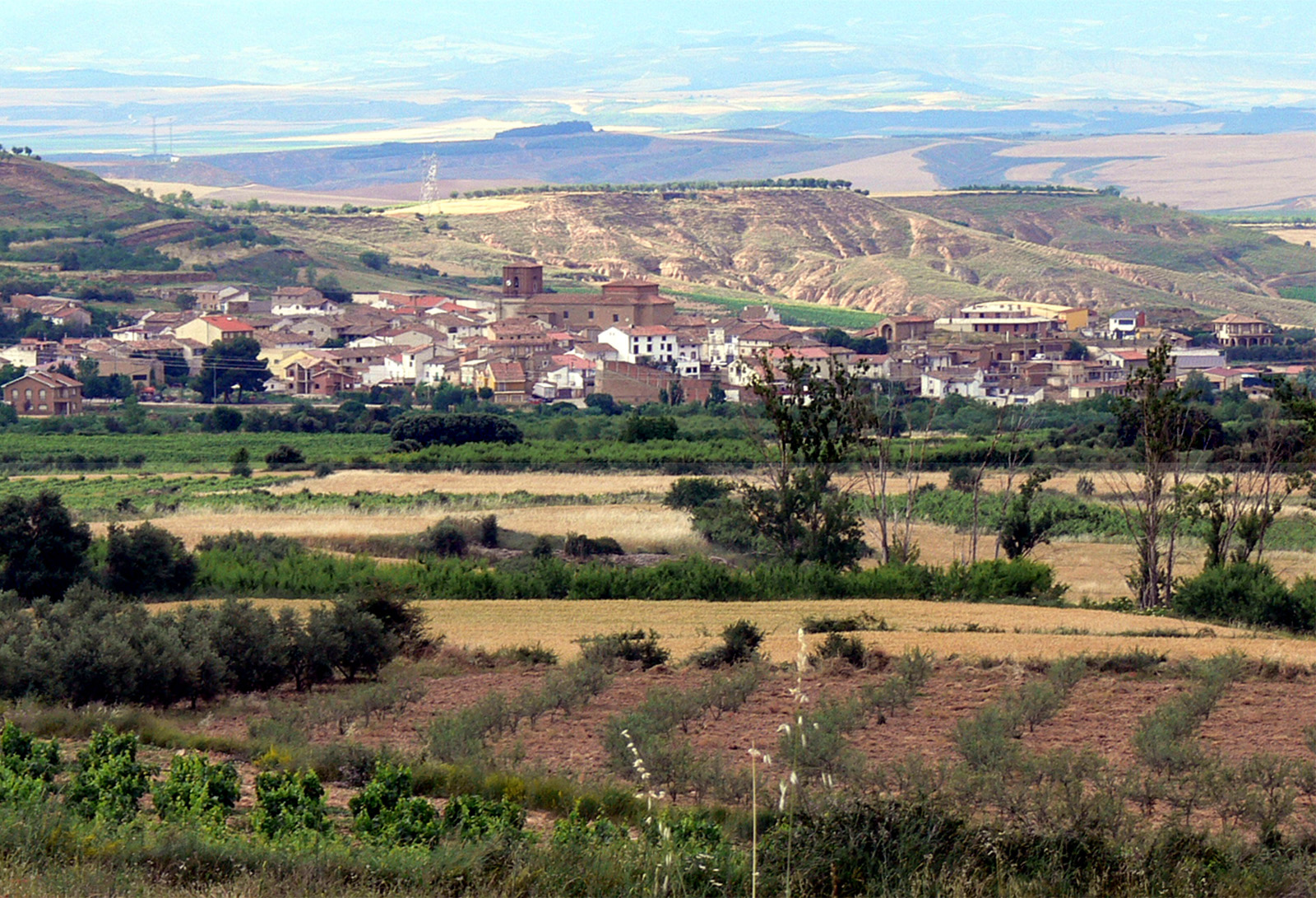 Vista de Corera, municipio de La Rioja (España).